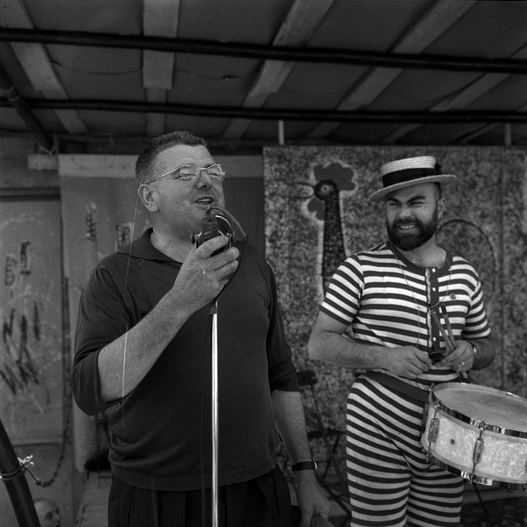 Noé (Haute-Garonne). 9 juillet 1961. Portrait en plan 3/4 de Jean-Baptiste Doumeng, maire de Noé, parlant au micro sur scène lors de l'élection de la Belle Gaillarde. Au second plan à droite un musicien de la fanfare de l'école des Beaux-Arts de Paris. Observation: "La Belle Gaillarde" est une éléction de miss qui a été créée à Noé (Haute-Garonne) durant l'été 1960 par Jacques Esterel, chansonnier et couturier, et Jean-Baptiste Doumeng, homme d'affaire et maire de Noé. L'élection de 1961 s'est déroulée du 8 au 10 juillet.